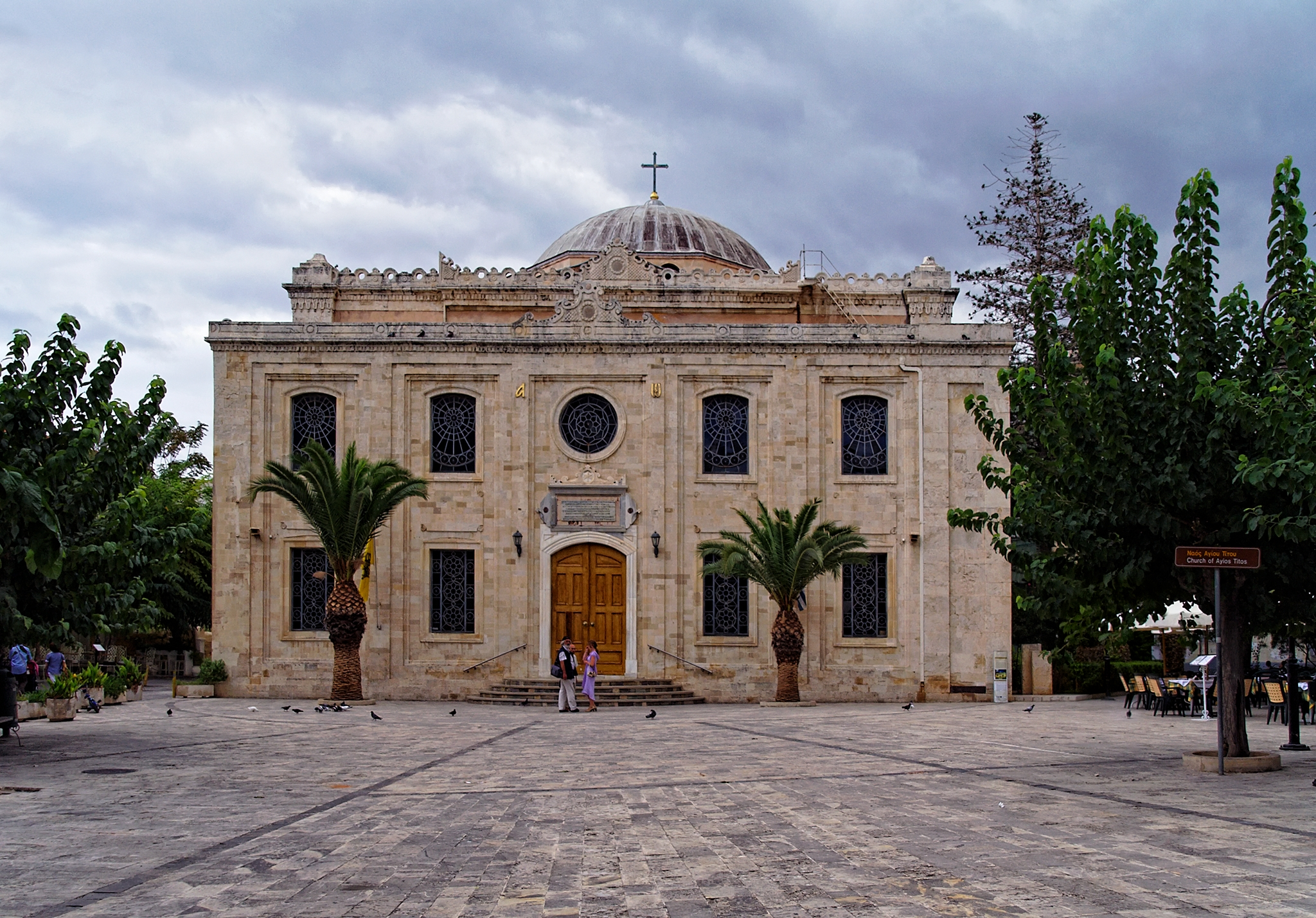 ο ναός του Αγίου Τίτου στο Ηράκλειο